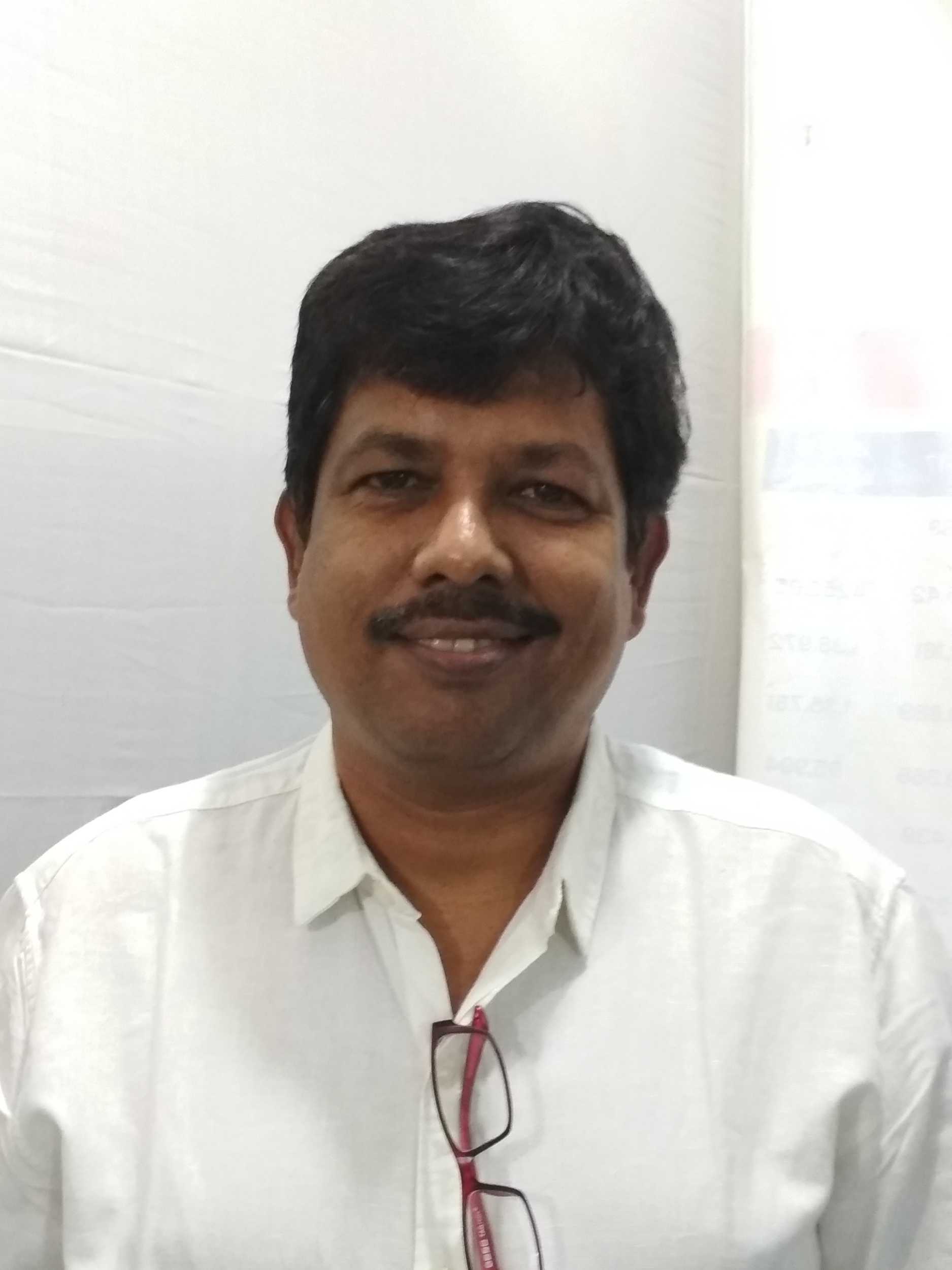 Khadeer babu at Vijayawada book festival